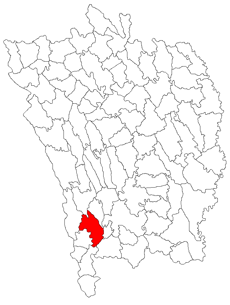 Categorie:Hărţi ale judeţului Vaslui